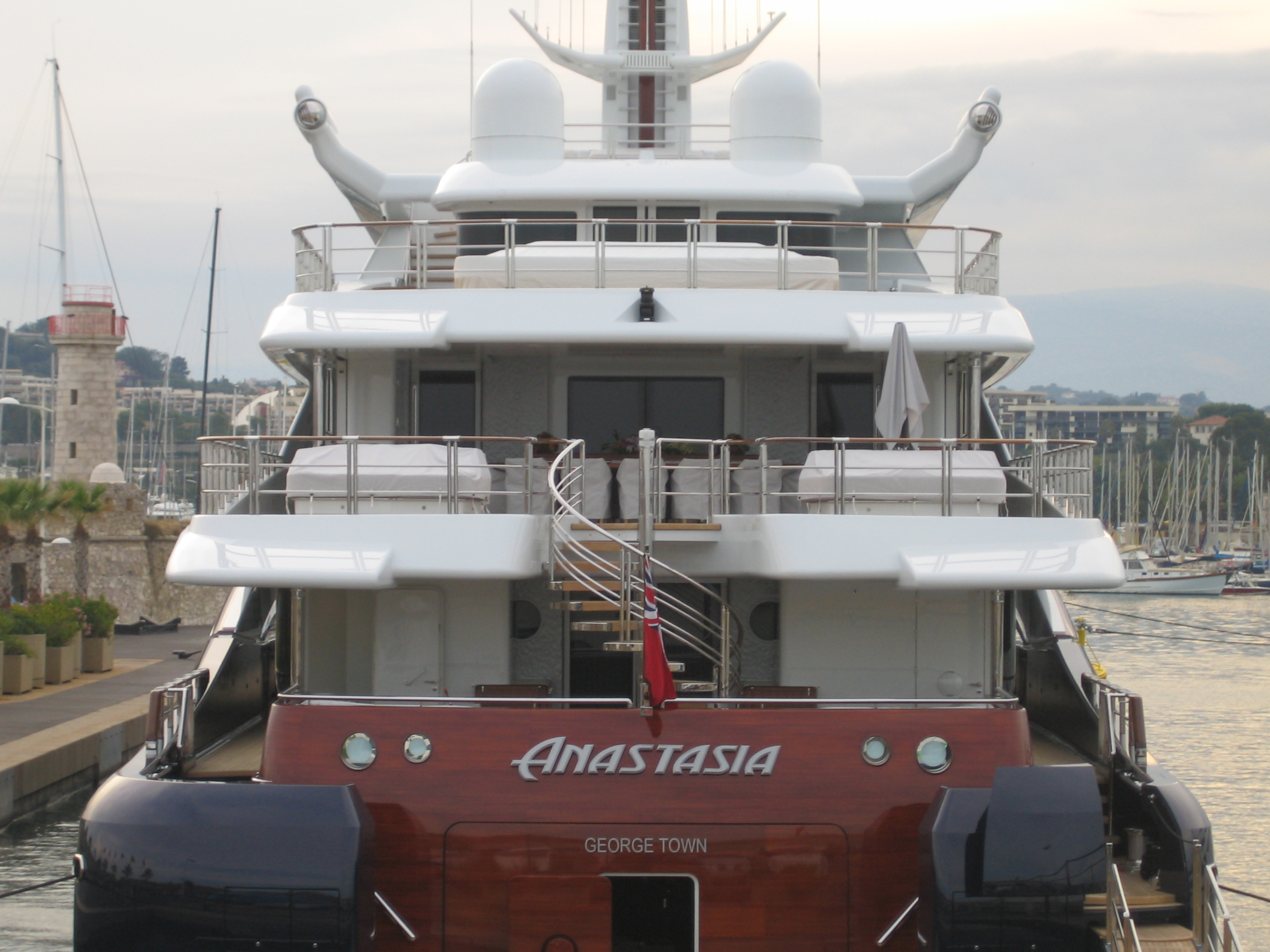 L'Anastasia (75 mètres) au port d'Antibes. Ce bateau a été construit en 2008 par les chantiers Oceanco.